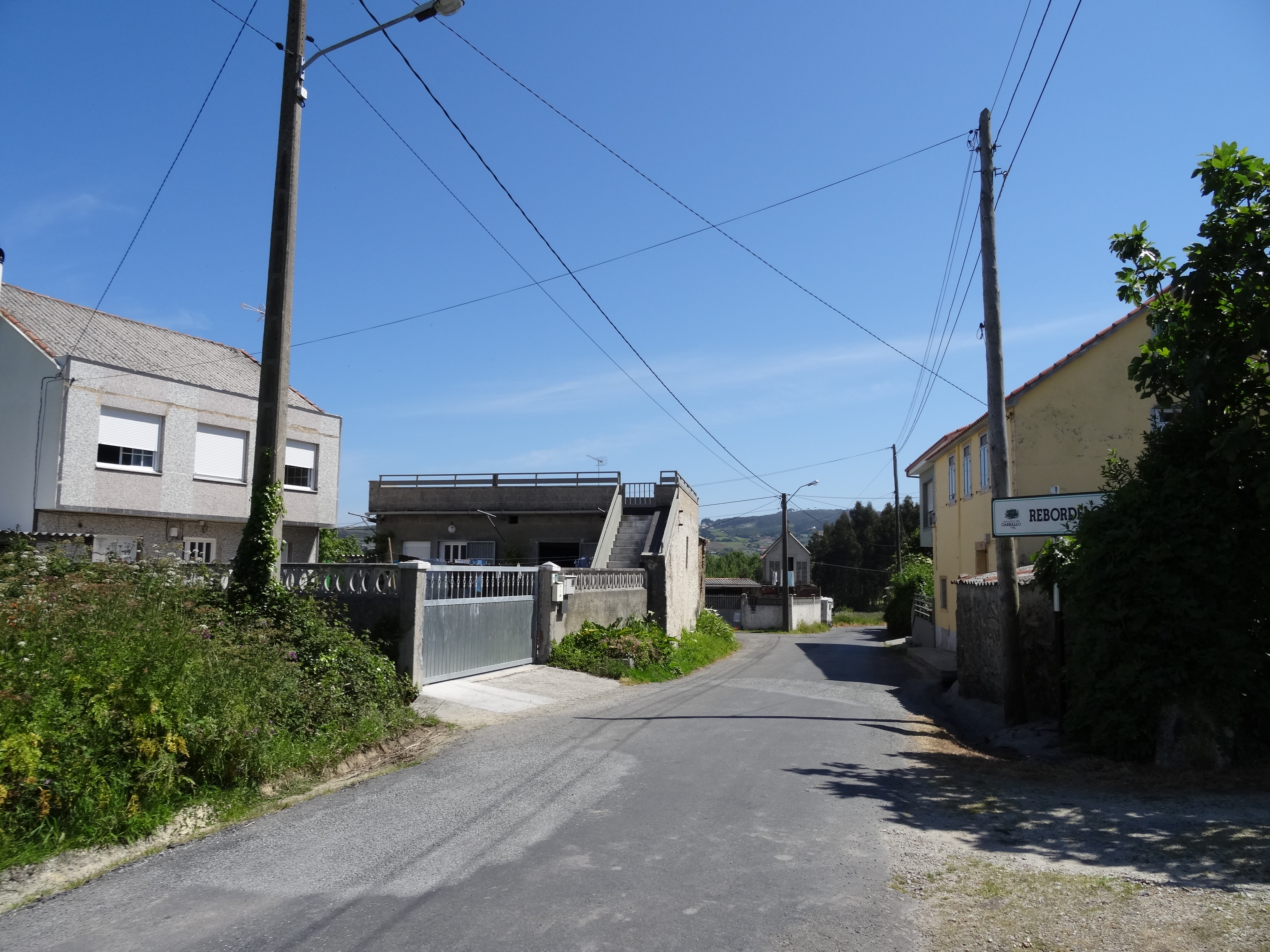 Rebordelos, Carballo.